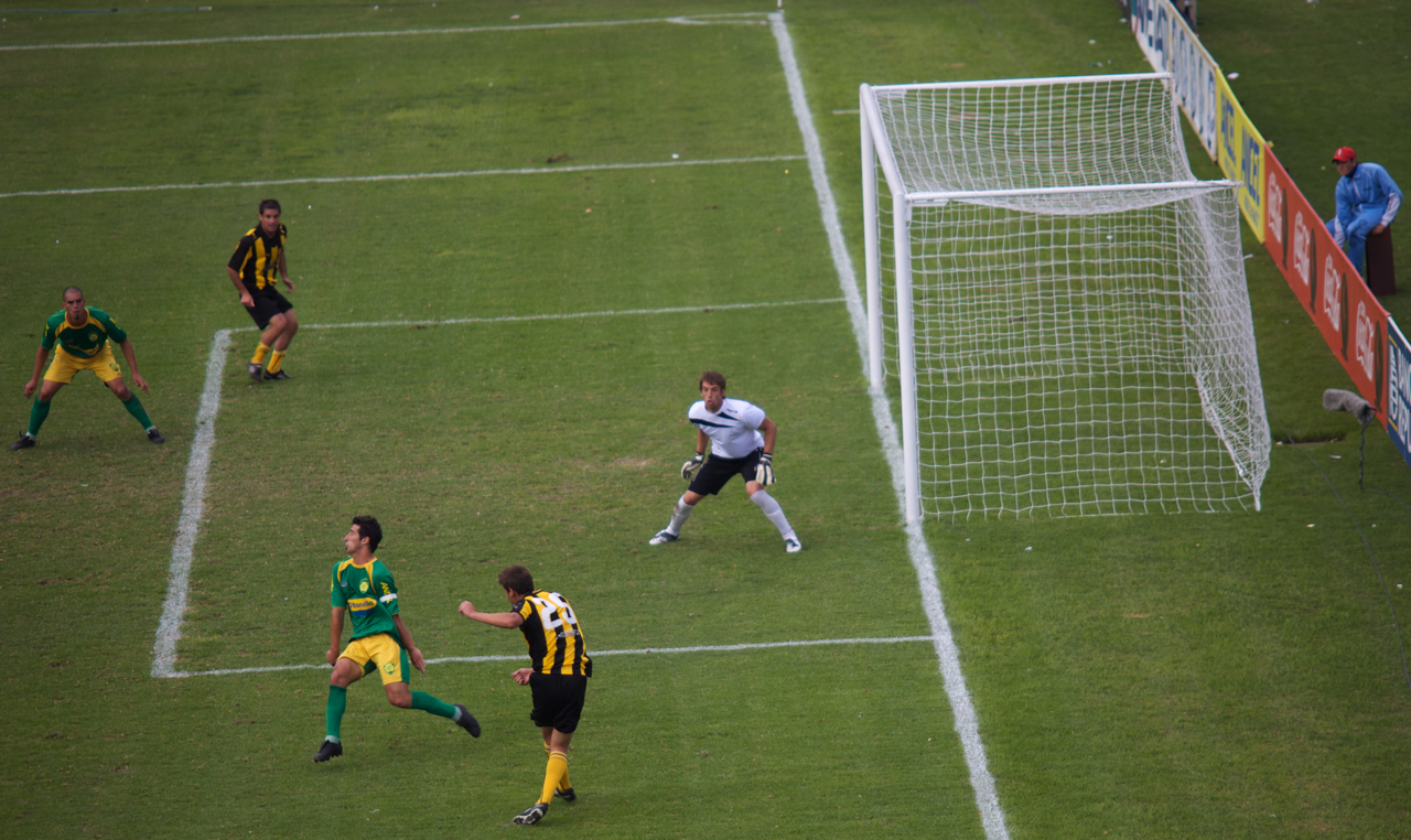 Peñarol durante un encuentro frente a Cerrito en abril de 2010.